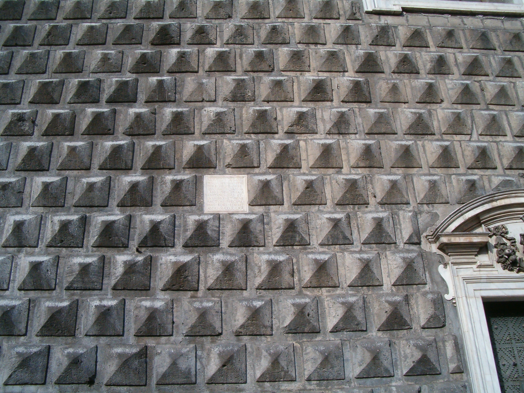 Napoli, Chiesa del Gesù Nuovo - Facciata con bugne a punta di diamante che mostrano i segni delle squadre di cavatori e scalpellini pipernieri; secondo una leggenda si tratta invece di segni magici, causa delle numerose sciagure che si sono abbattute sul luogo. Al centro, epigrafe marmorea che ricorda l'architetto dell'originario Palazzo Sanseverino, Novello da San Lucano e l'anno di edificazione 1470.